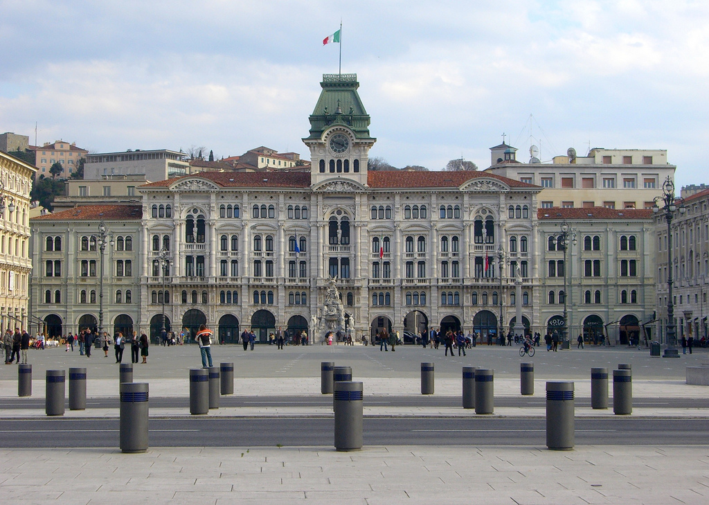 Piazza Unita